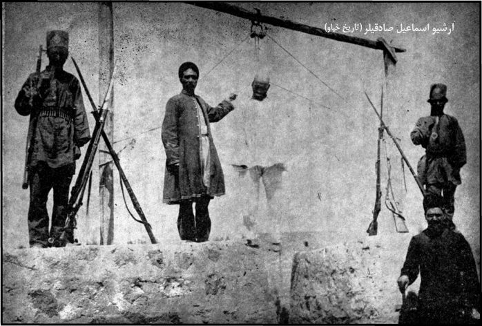 اعدام ملا امام‌وردی روی پشت‌بام نارین قلعه اردبیل